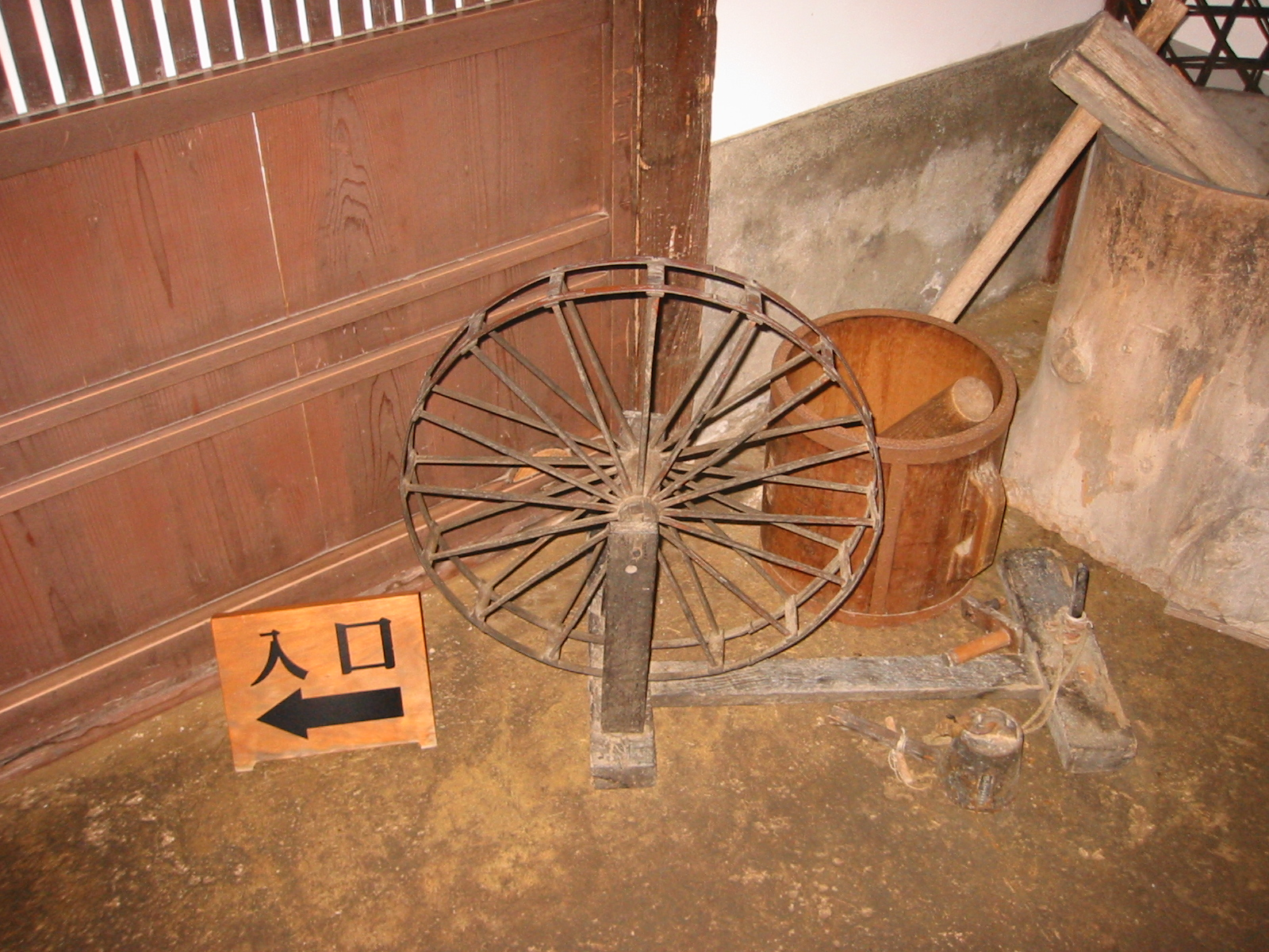 篠山市立青山歴史村